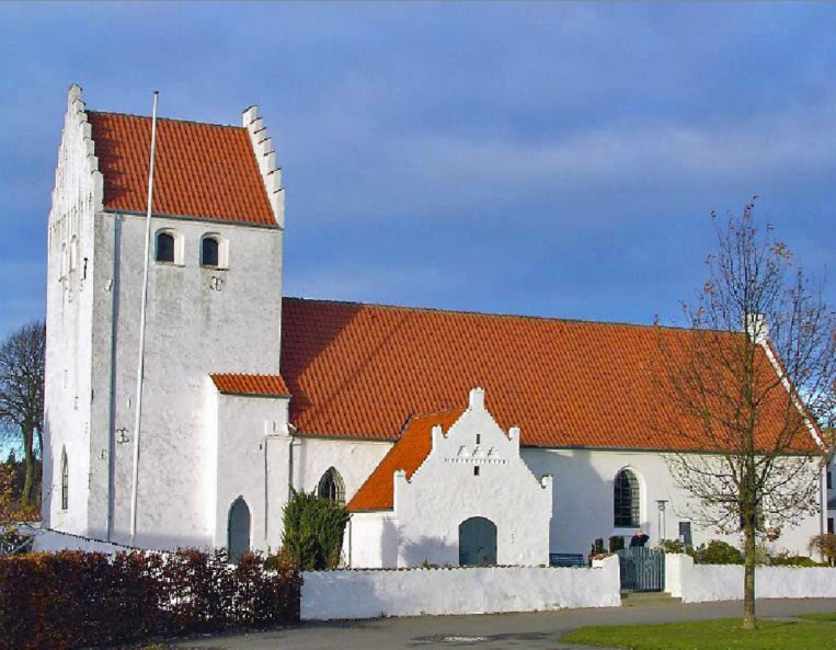 Hørve kirke, Odsherred, fra sydvest